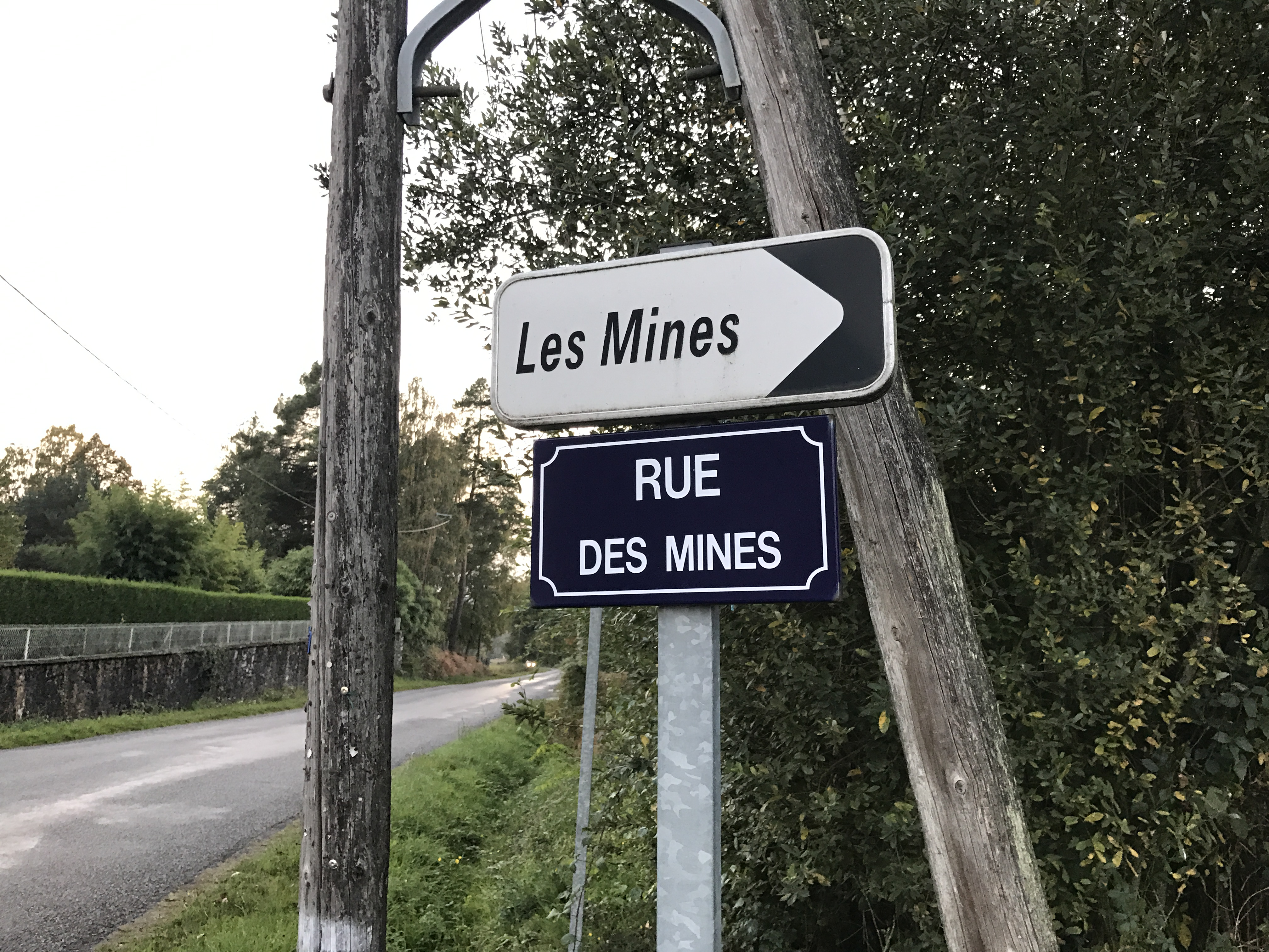 Toponymes rappelant le passé minier (or) entre Beaune-les-Mines et Rilhac-Rancon (Haute-Vienne, France).